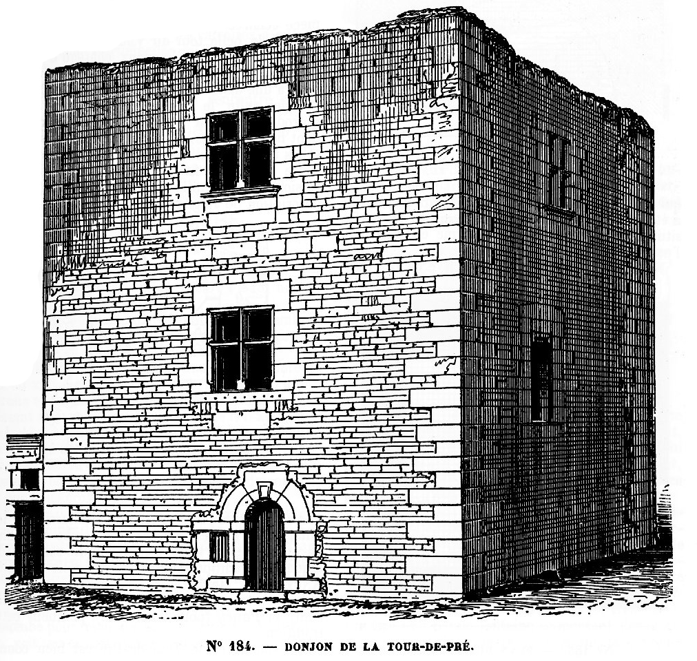 Provency - donjon de Tour de Pré